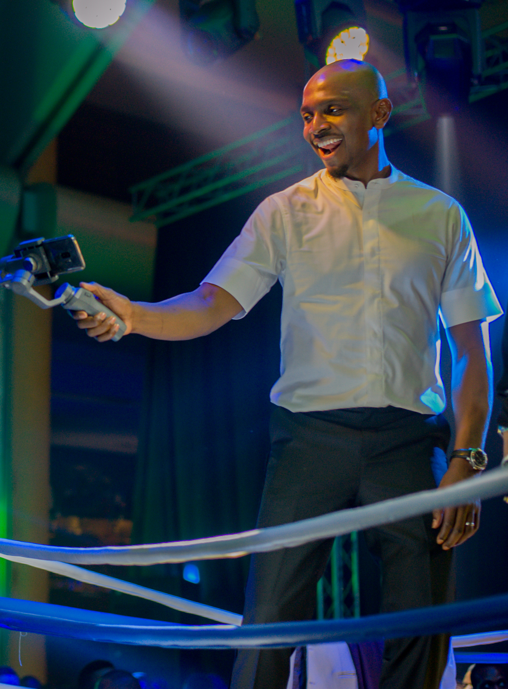 Ik Osakioduwa at AMVCA 2020